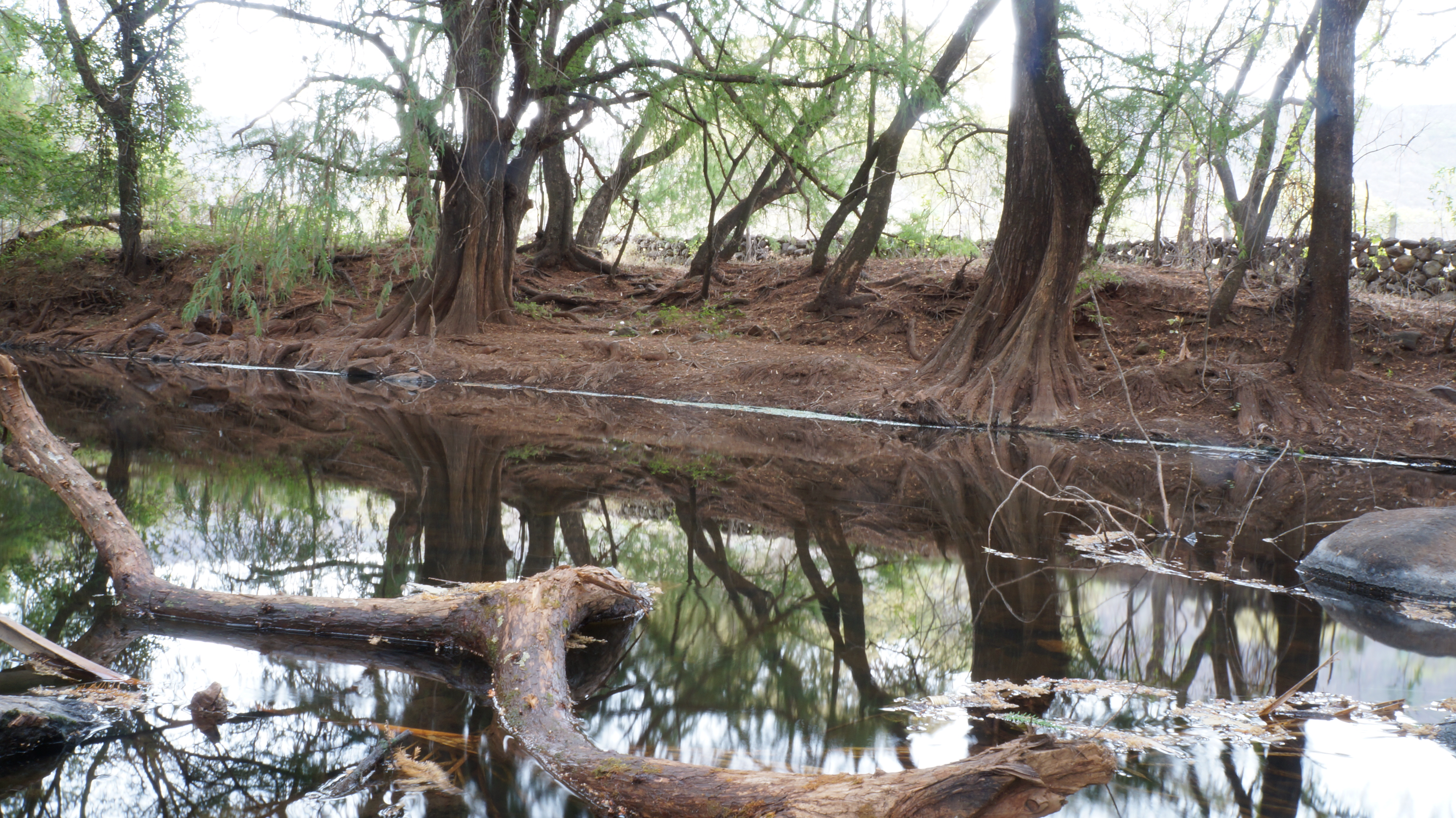 Excelente para convivir en familia.